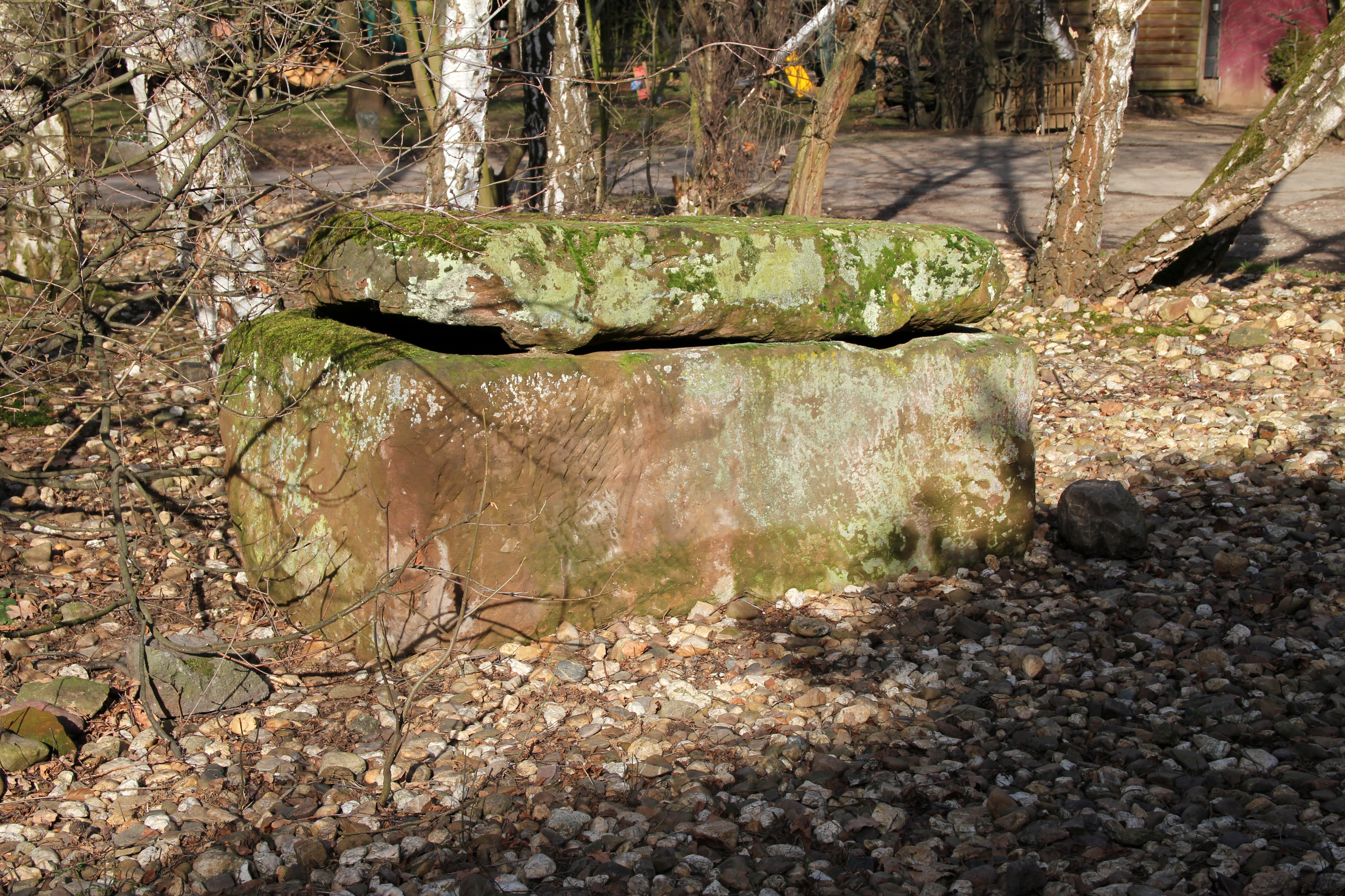 Burg Blessem. Ein im Innenhof der Burg Blessem aufgestellter Sarkophag ist wahrscheinlich fränkischer Herkunft. Er wurde vor mehreren Jahren von Gut Mersheim Kreis Düren nach Erftstadt verlagert. Der Sargtrog hat die Maße von 1820/1930 x 940 x 640 mm. Die Abdeckplatte misst 1600 x 280/290 mm. Bei den aus rötlichem Sandstein gefertigten Stücken vermutet man aufgrund der differierenden Längen, dass es sich um unterschiedliche Grabfunde handelt. Beschreibung nach Bernhard Schreiber: Archäologische Funde und Denkmäler des Erftstädter Raumes. Erftstadt 1999. Seite 125